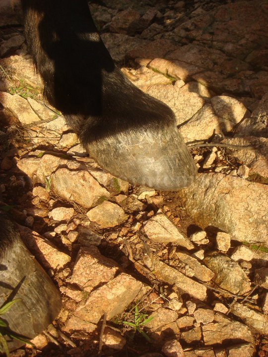 Des sabots non ferré travaillant sur des sols tres durs